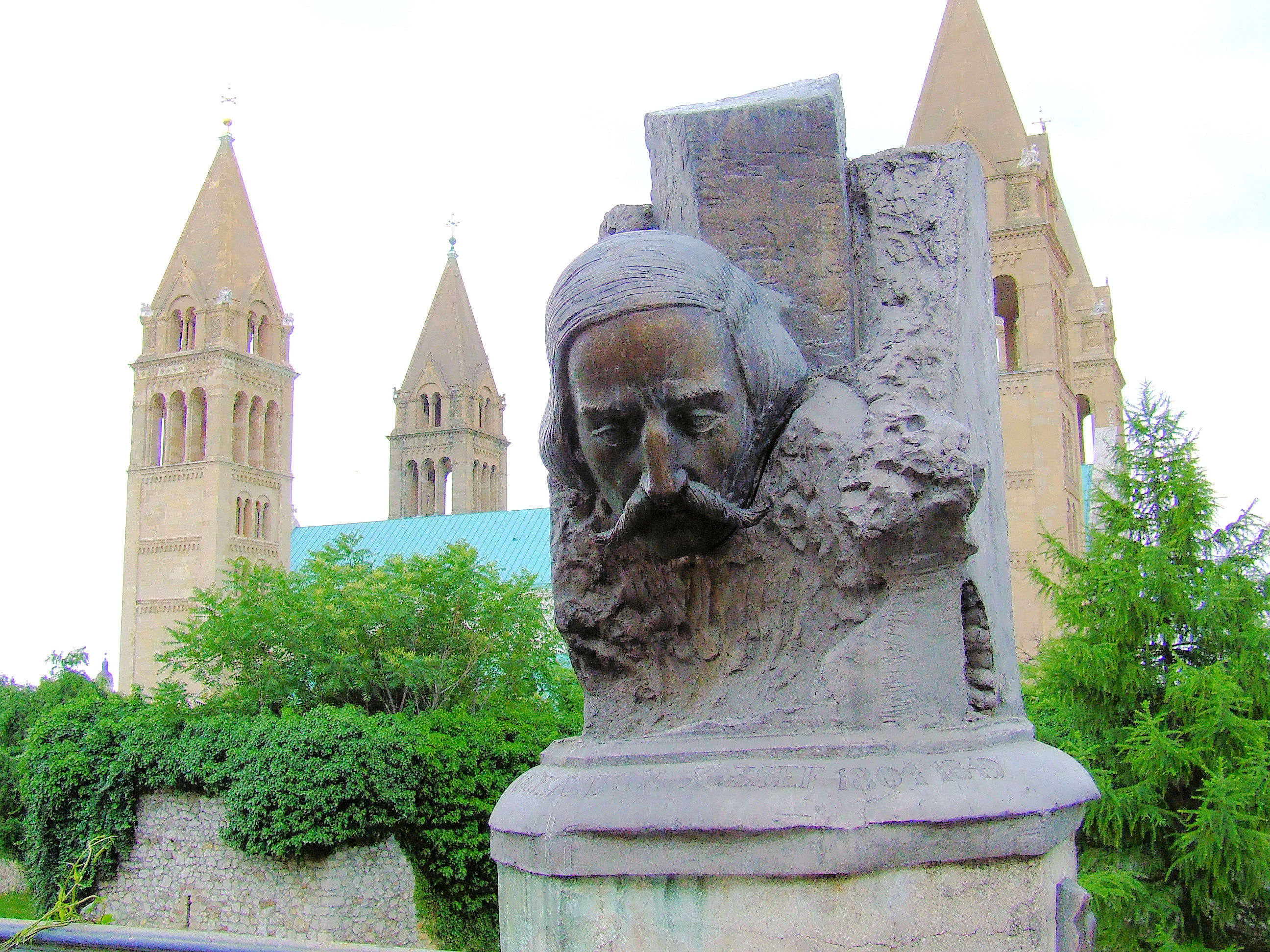 Nagysándor József honvéd vezérőrnagy, aradi vértanú szobra Pécsen. Rétfalvi Sándor alkotása (1993)